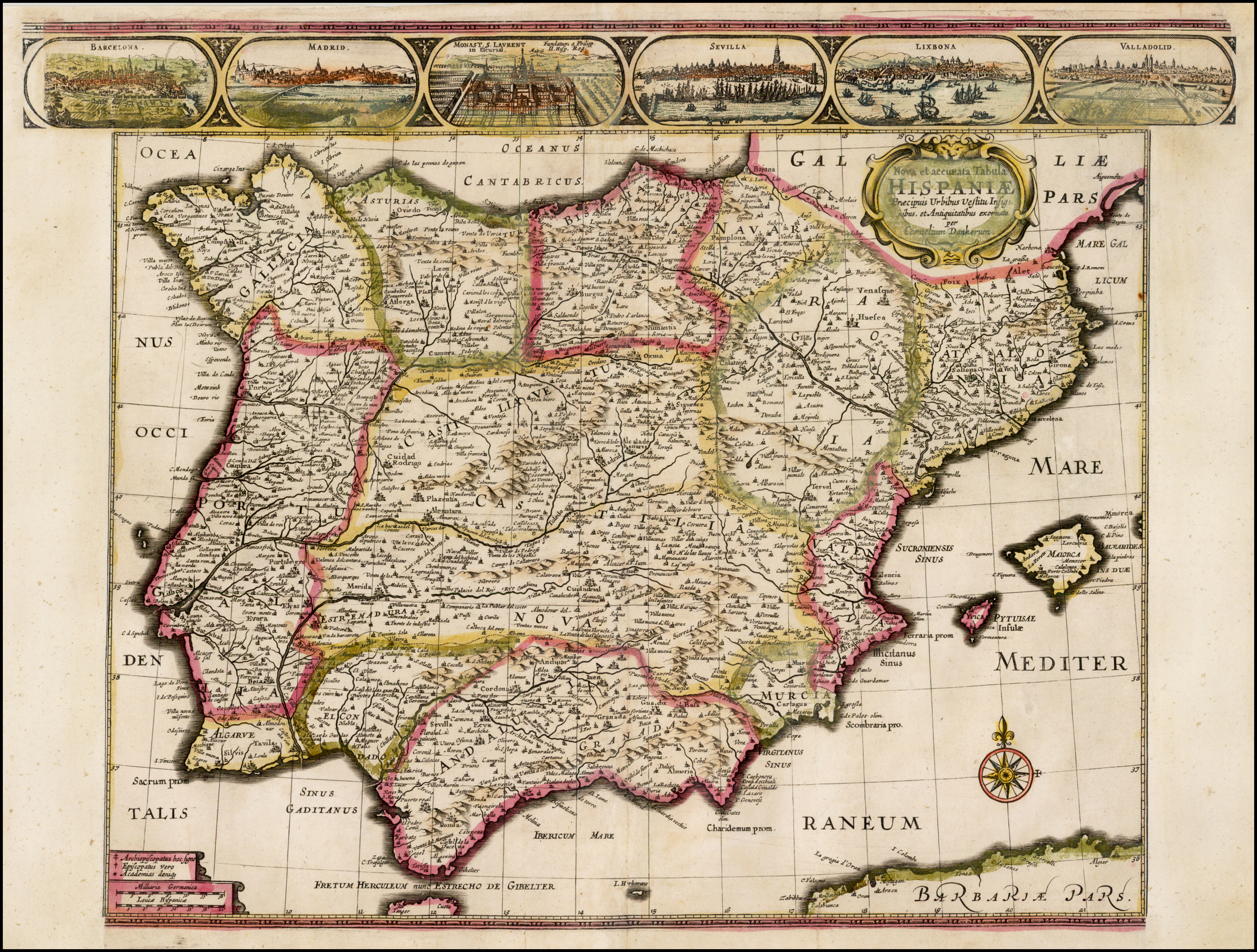 Mapa de España en 1640